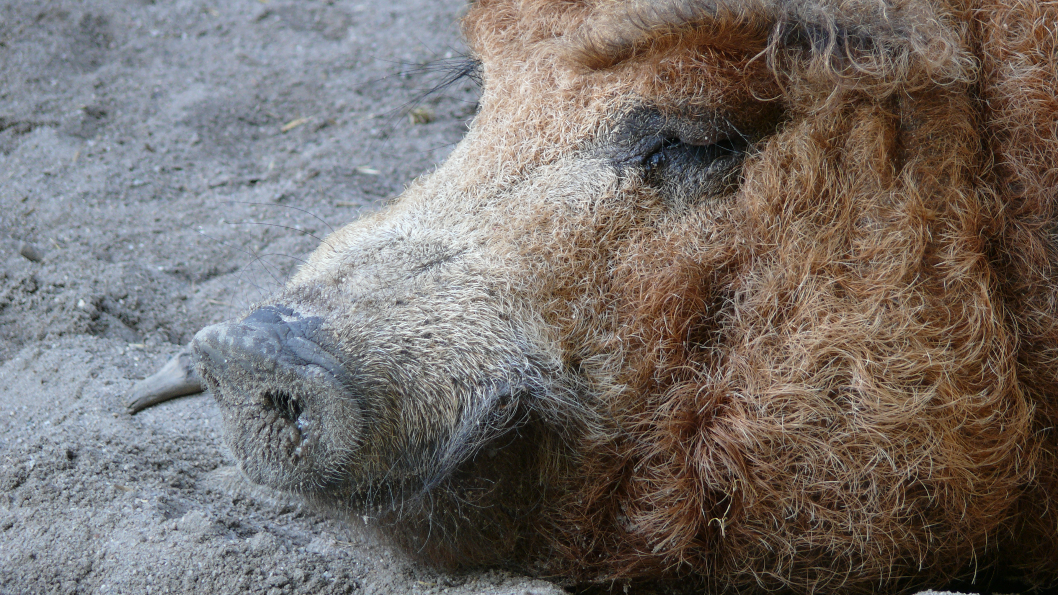 Wollschwein-/Magnalica-Eber (fotografiert im Herzogenriedpark Mannheim)